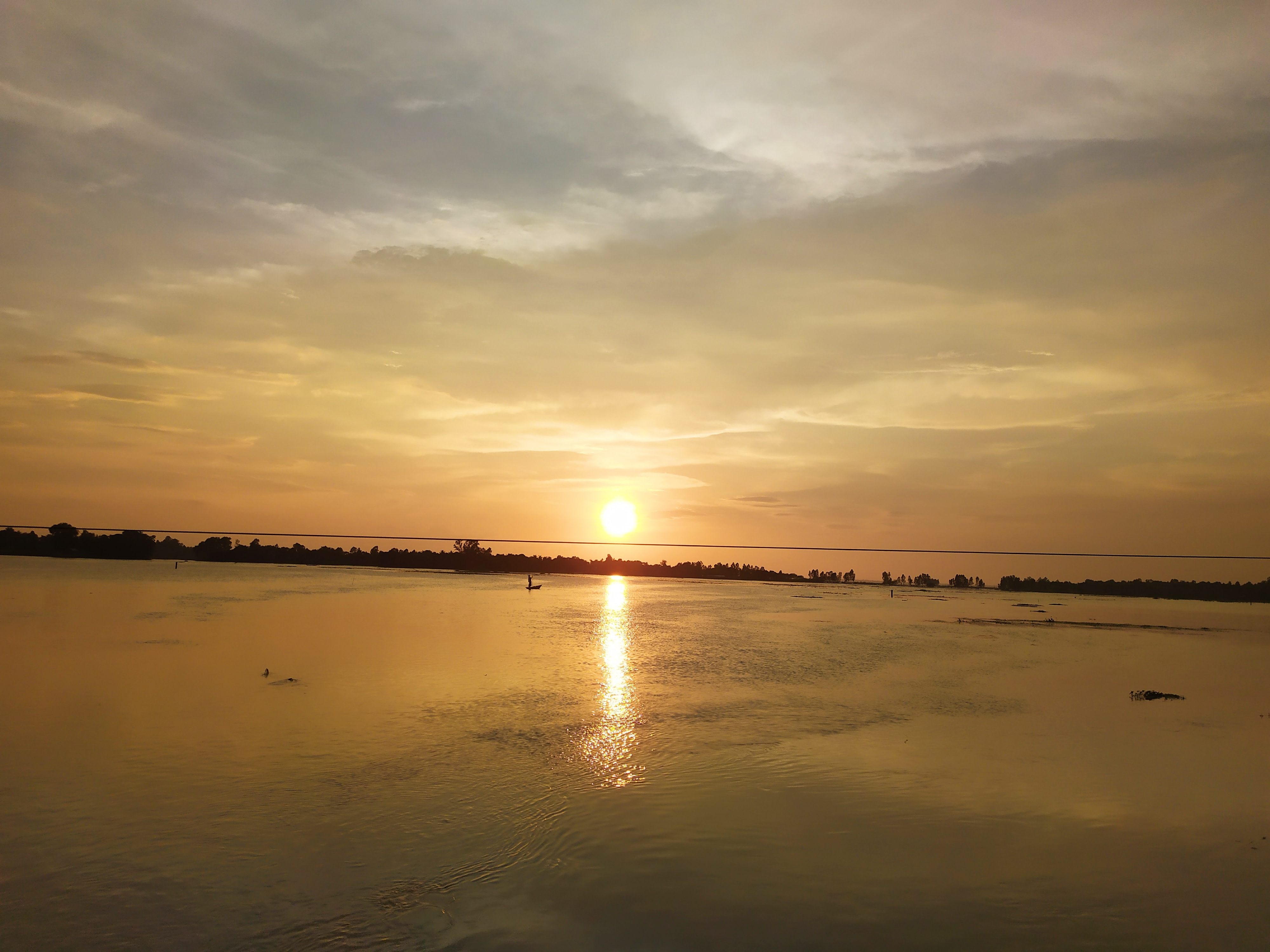 হালতি বিল